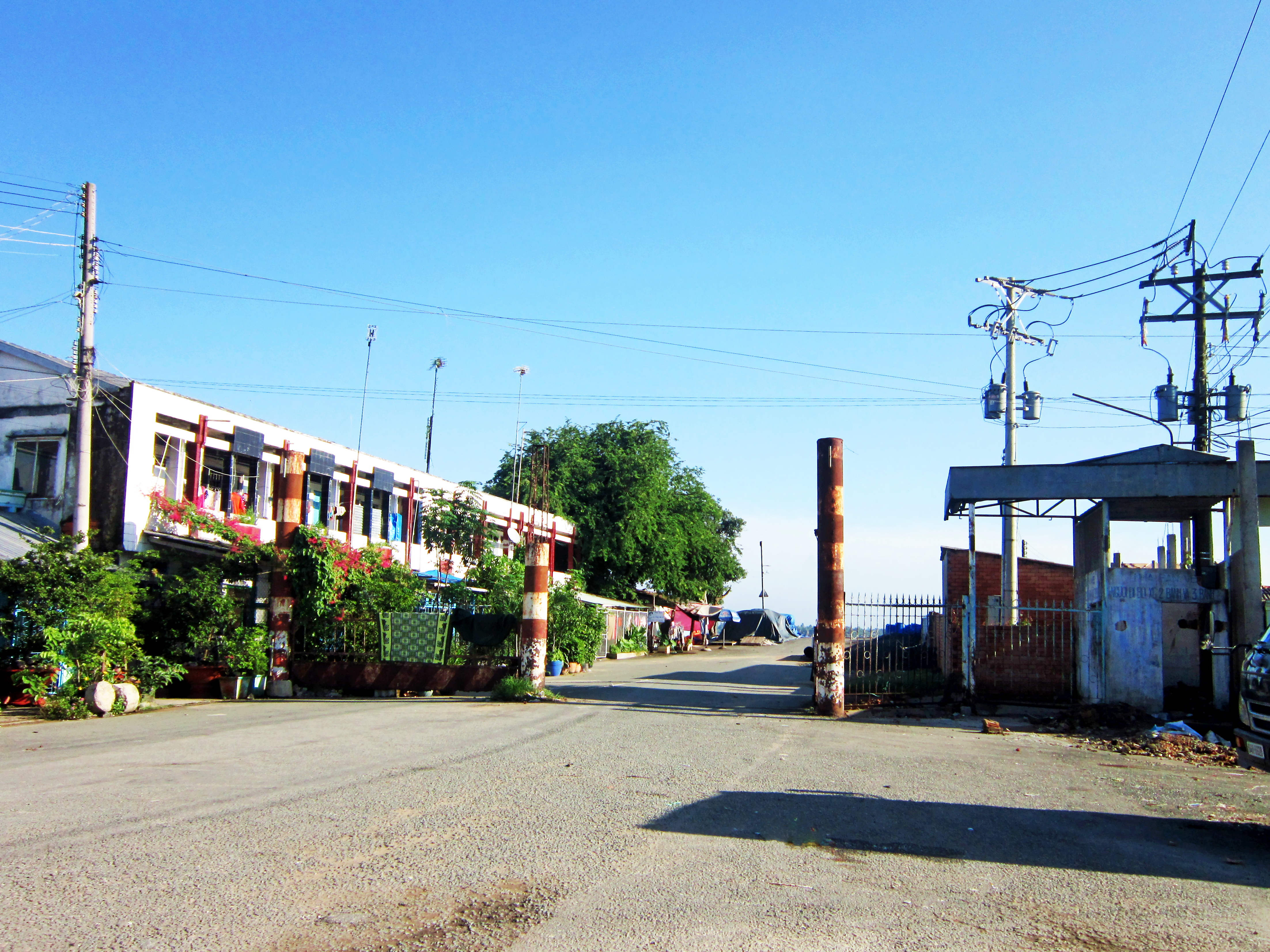 Bờ nam của phà Mỹ Thuận, nay đã tiêu điều sau khi phà ngưng hoạt động vào năm 2000. Bờ thuộc ấp Mỹ Thuận, xã Tân Hội, thành phố Vĩnh Long (Việt Nam).